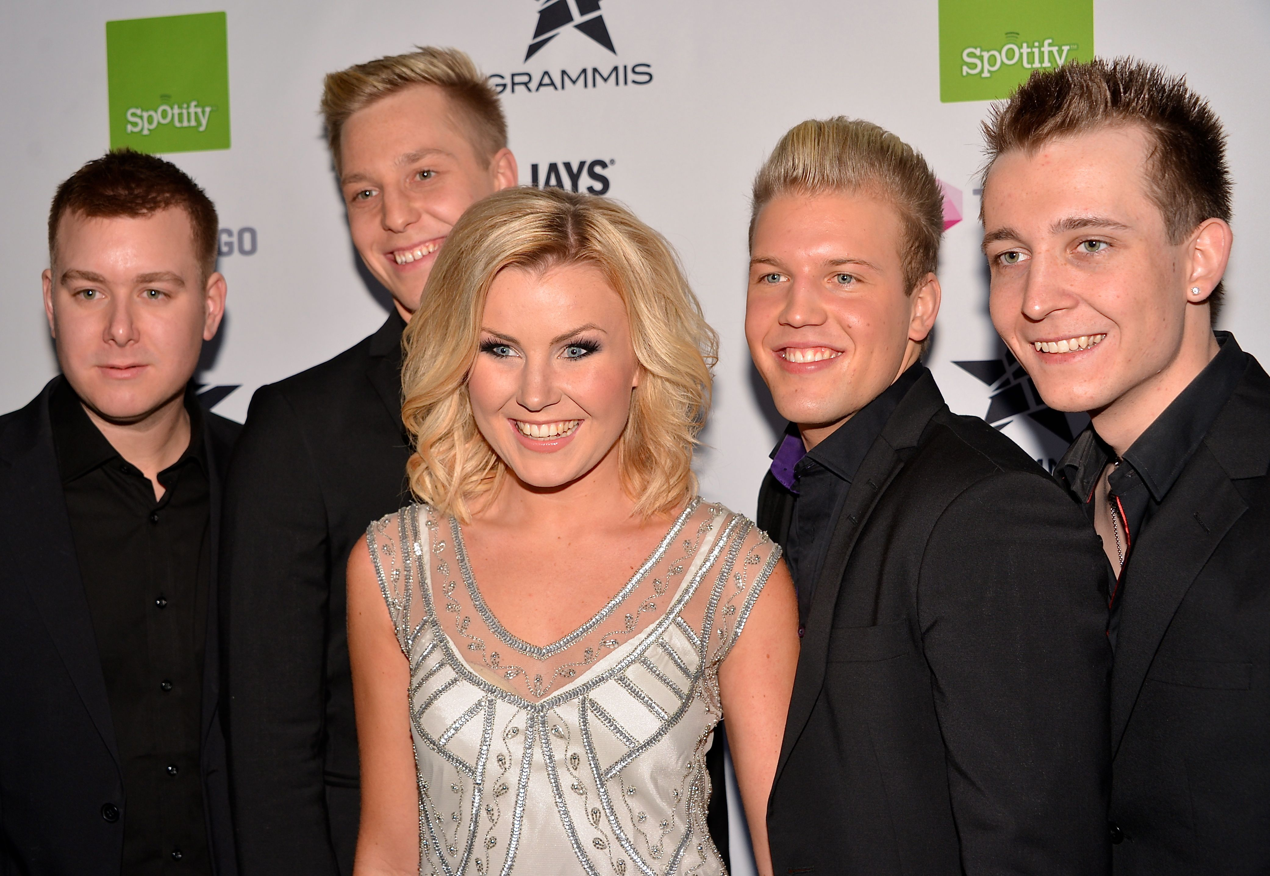 Elisa's på Grammisgalan på Cirkus, Stockholm den 20 februari 2013.